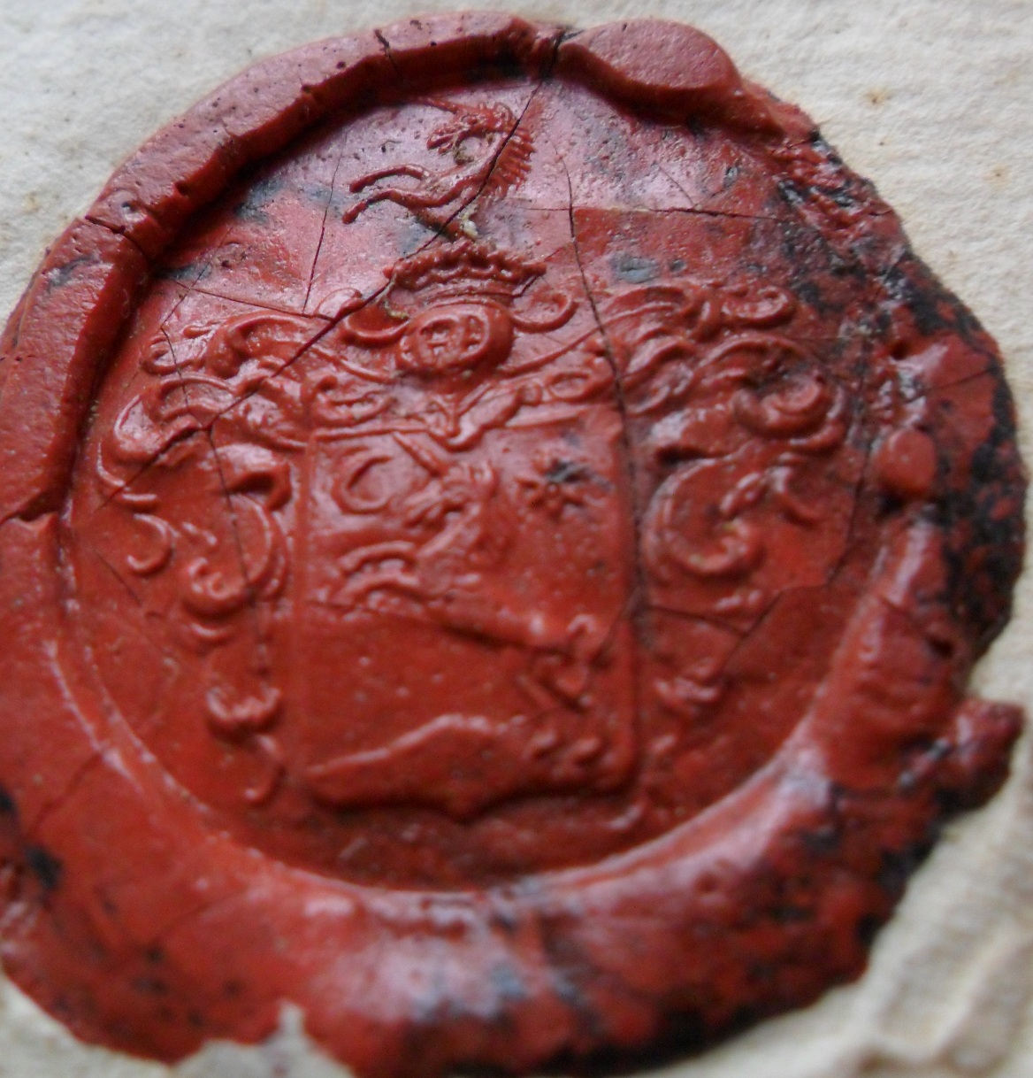 Rosty Ferenc alispán vasi alispán címeres viaszpecsétje